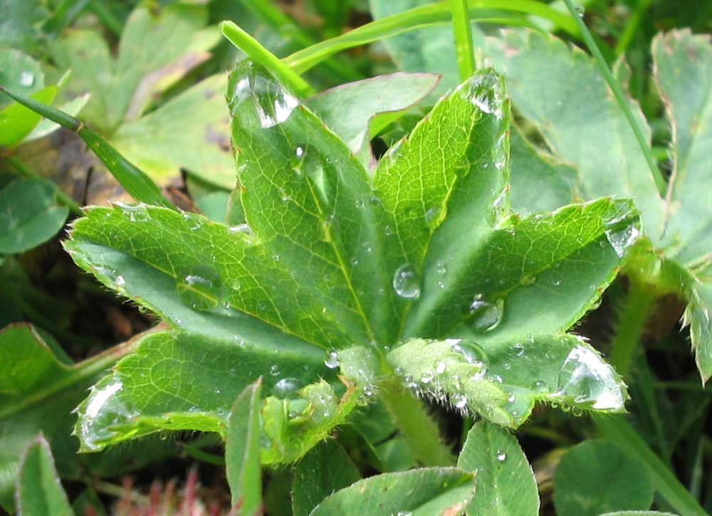 Gew. Frauenmantel Alchemilla vulgaris (Blatt/leaf). 26. Juli 2005 10h